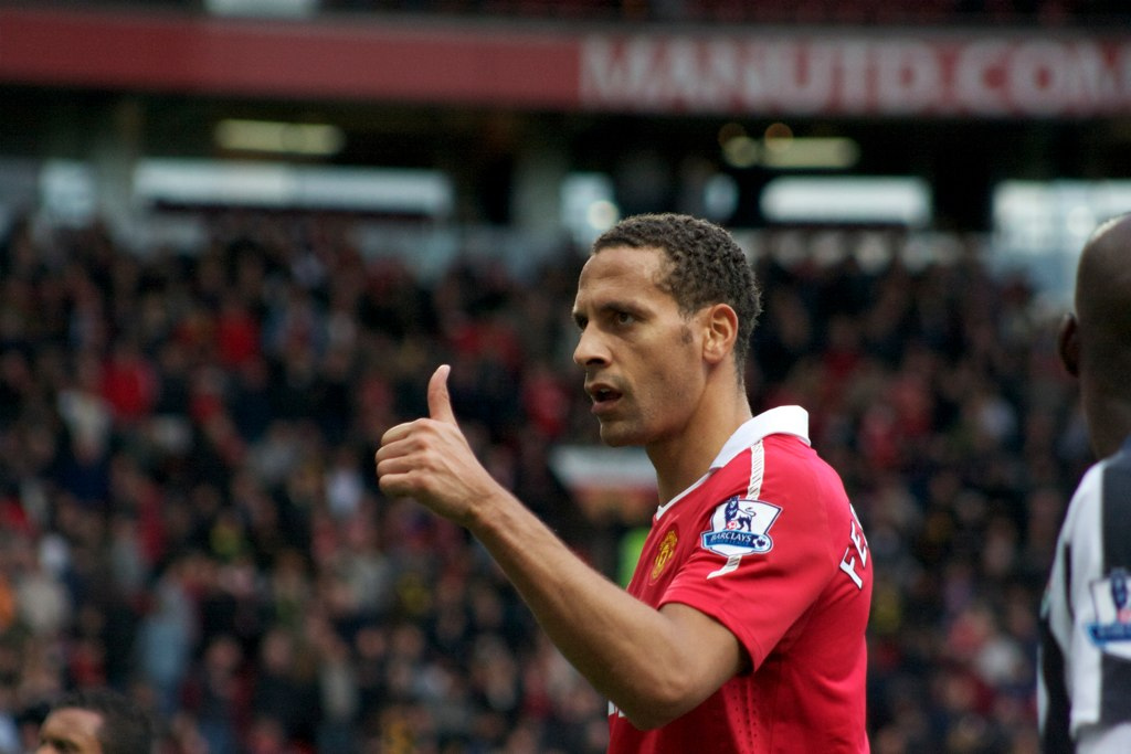 Rio Ferdinand